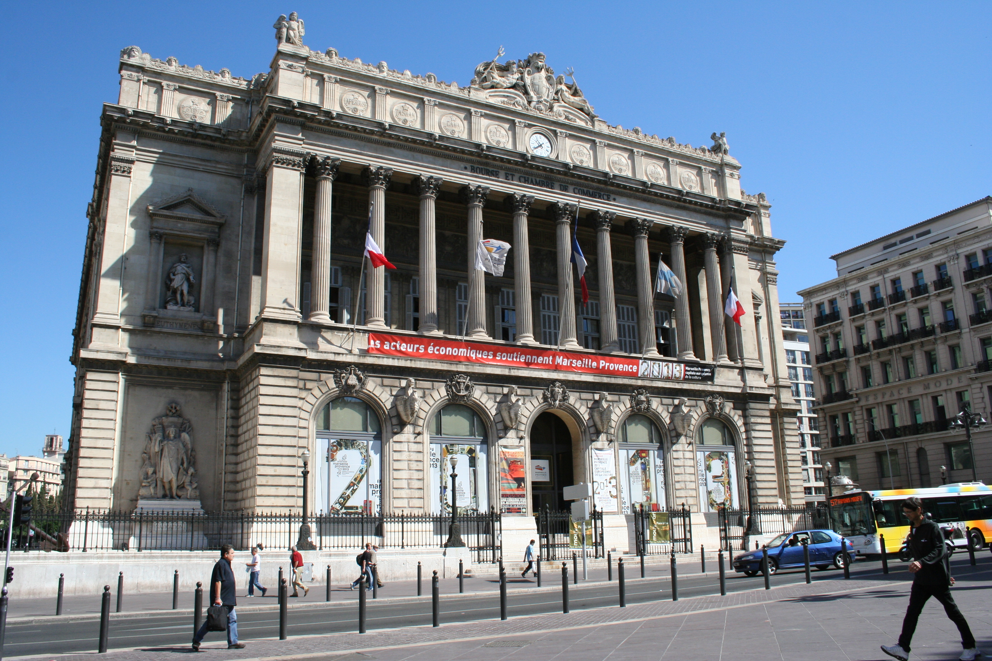 Palais de la bourse à Marseille, façade sur la canebière